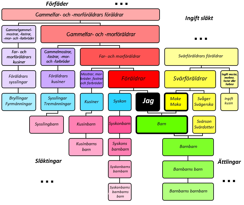 Grafisk uppställning av släktskapsbegrepp i svenska språket.